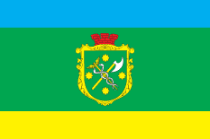 Прапор Бердичева